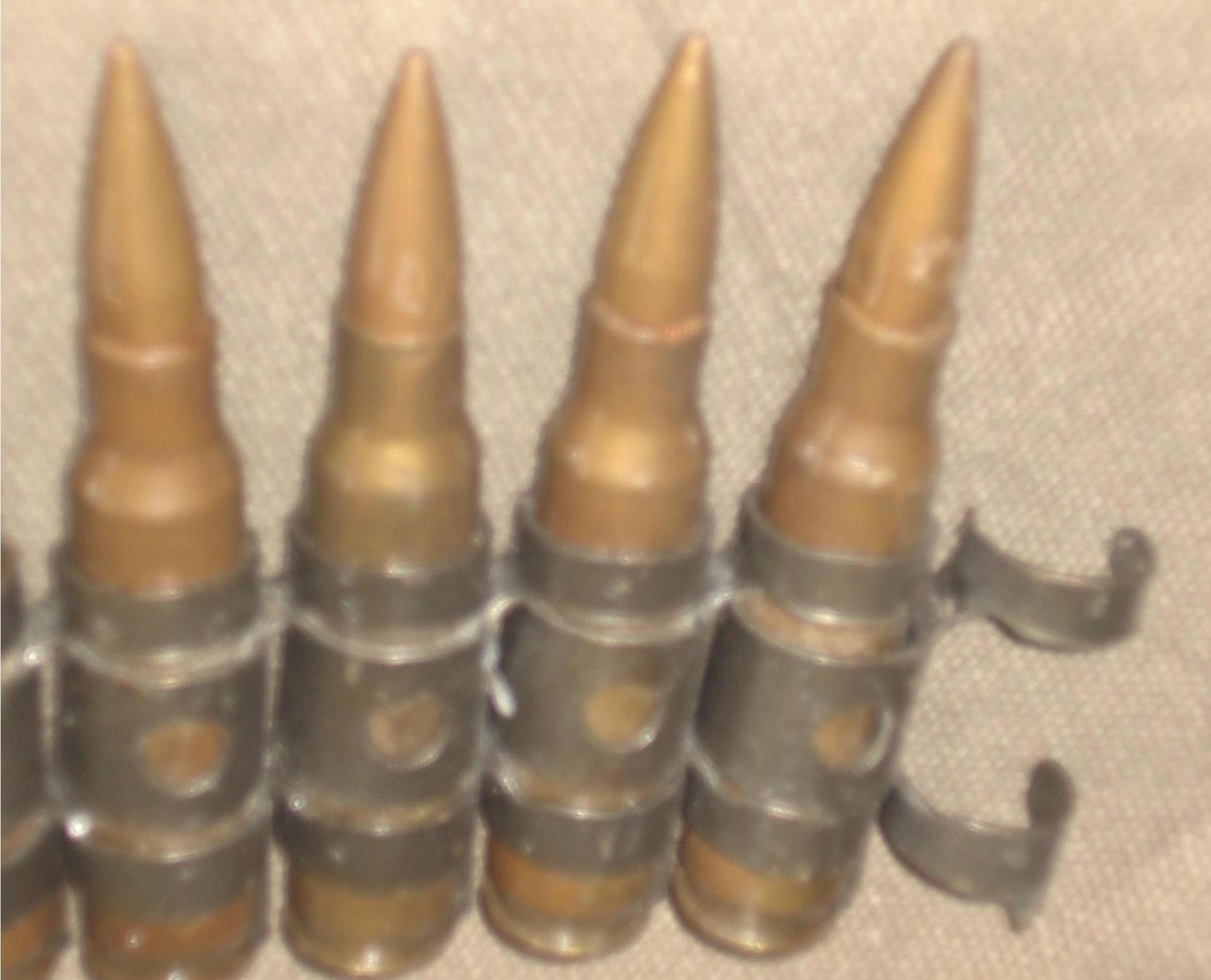 Viên đạn 7.62 li dùng cho M134 Hình tự chụp, phát hành trong wikipedia, cho phép sử dụng dưới mọi hình thức.